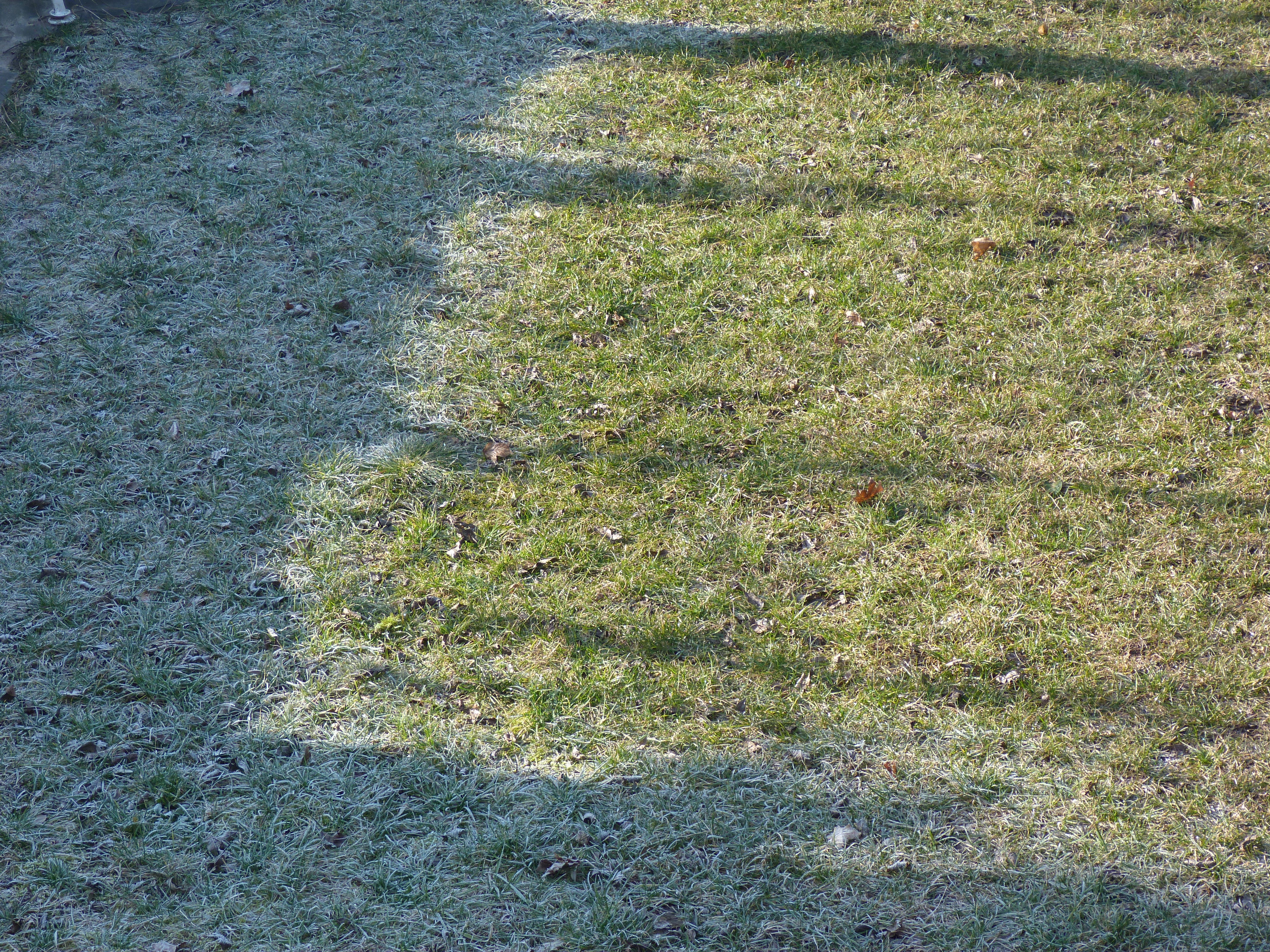 A felvétel Budán készült 2015 február 20-án. A budai kert füvén a reggeli napfény által bevilágított területen a dér azonnal elolvad. ©© Derzsi Elekes Andor, Budapest, 2015, A fénykép másolását és felhasználását a szerző ellenérték nélkül, jogutódjaira is kihatóan megengedi. Az engedély kiterjed a kereskedelmi célú hasznosításra is. Kéri azonban nevének feltüntetését a felhasználás során. A Metapolisz sorozat valamennyi képe és filmje Creative Commons alatti valamint kereskedelmi - for profit - célra is felhasználható. Ajánlott hivatkozás: Derzsi Elekes Andor: Metapolisz DVD line